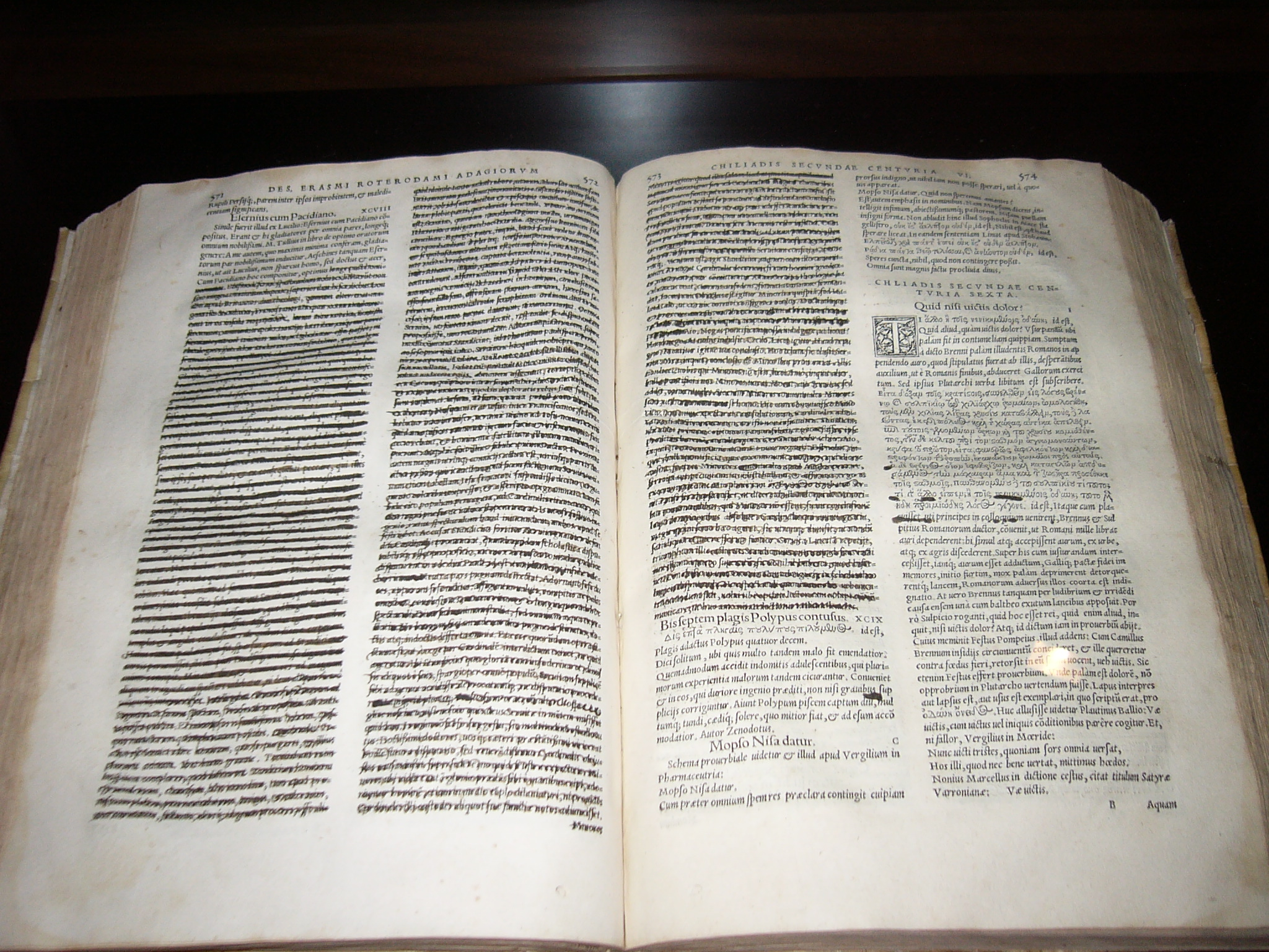 Description: Texto tachado por la Inquisición Subject: Los párrafos que aparecen tachados corresponden a la censura que ejerció la Inquisición sobre esta obra del humanista Erasmo de Rotterdam Book: Des Erasmi Roterdami Adagiorum Photographer: © Manuel González Olaechea y Franco Shot date: November, 9th, 2004